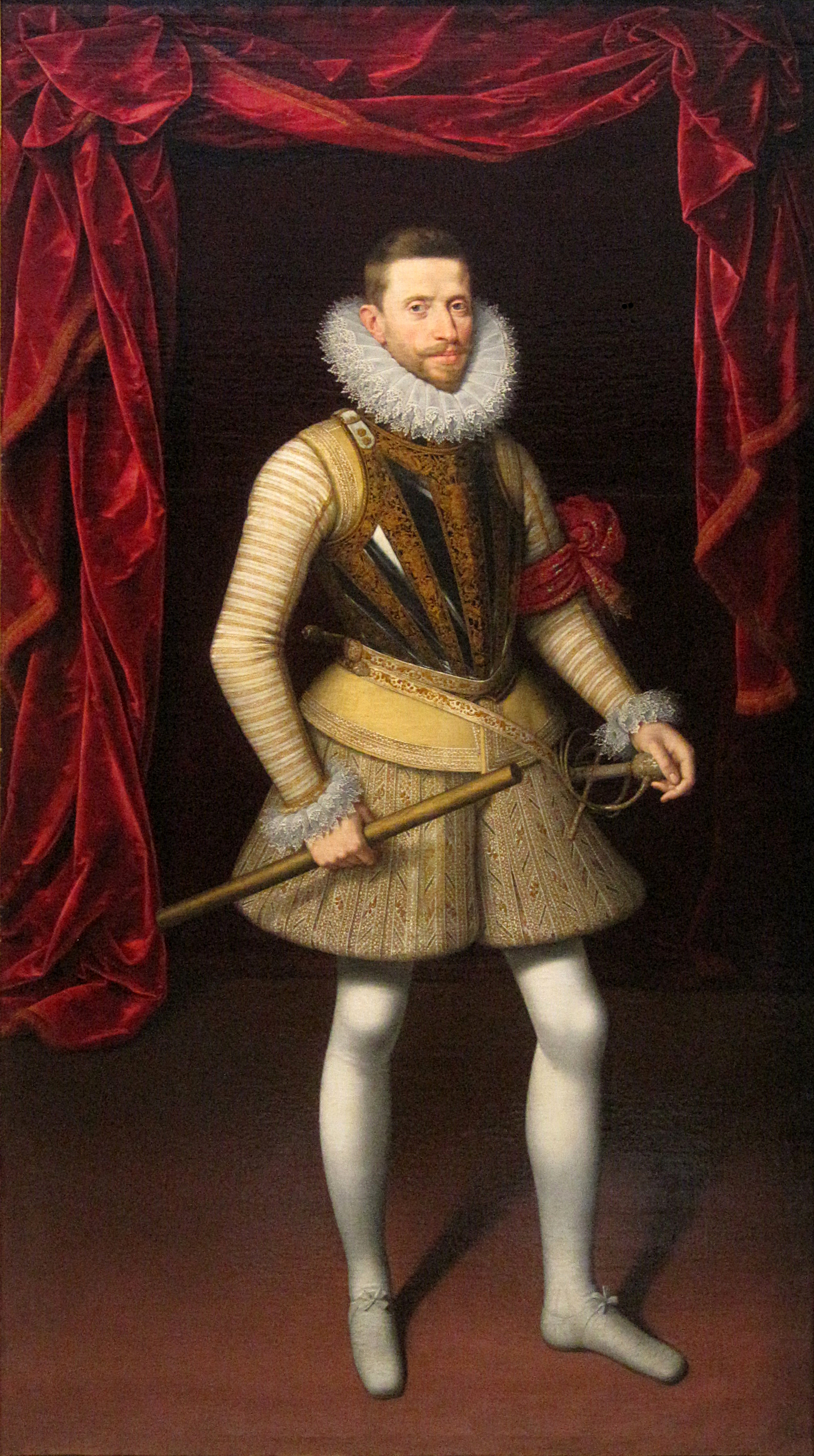 Retrato del archiduque Alberto de Austria (1559-1621), que fue hijo del emperador Maximiliano II de Habsburgo y de la emperatriz María de Austria y Portugal.